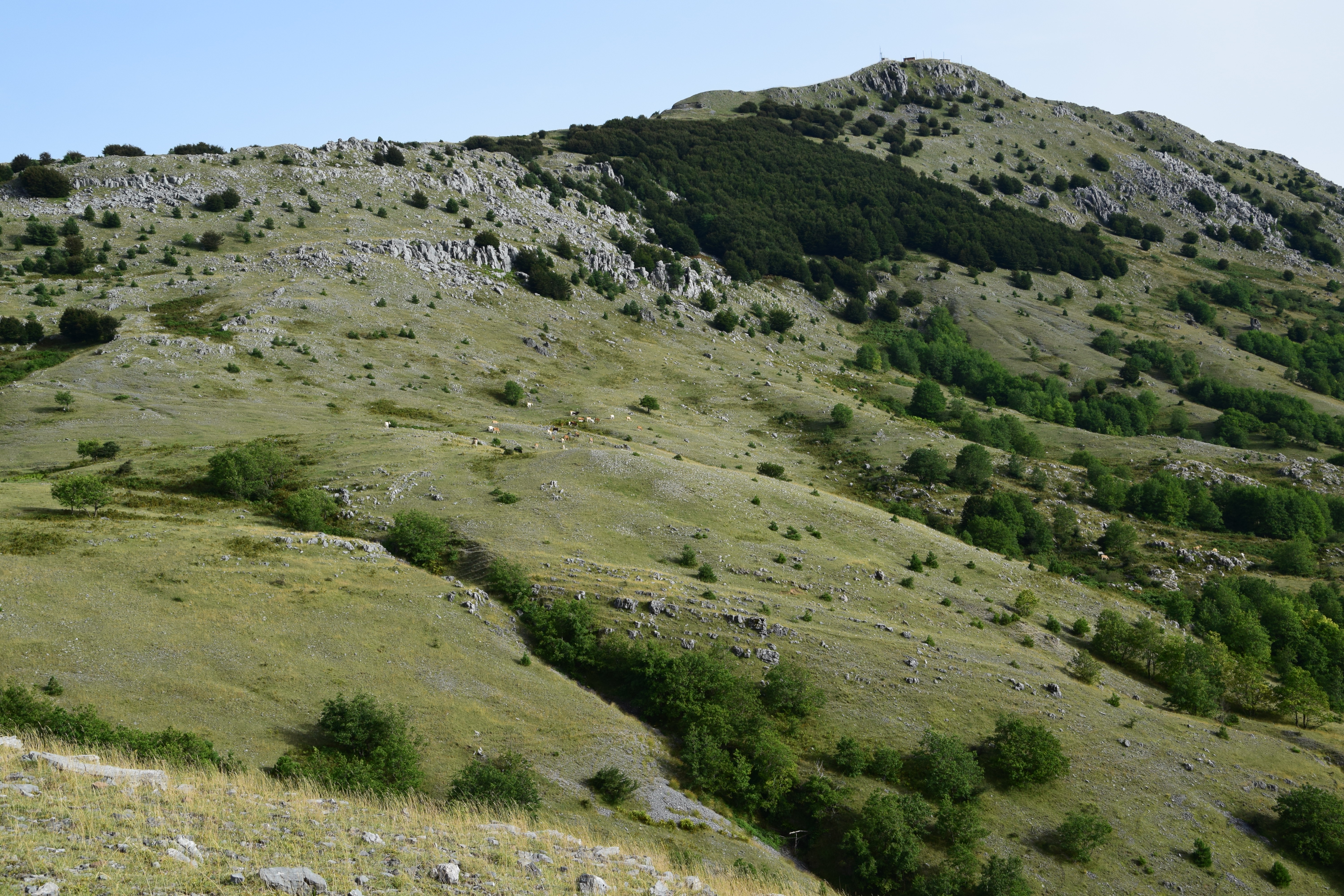 Monte Cocuzzo This is a photo of a monument which is part of cultural heritage of Italy.